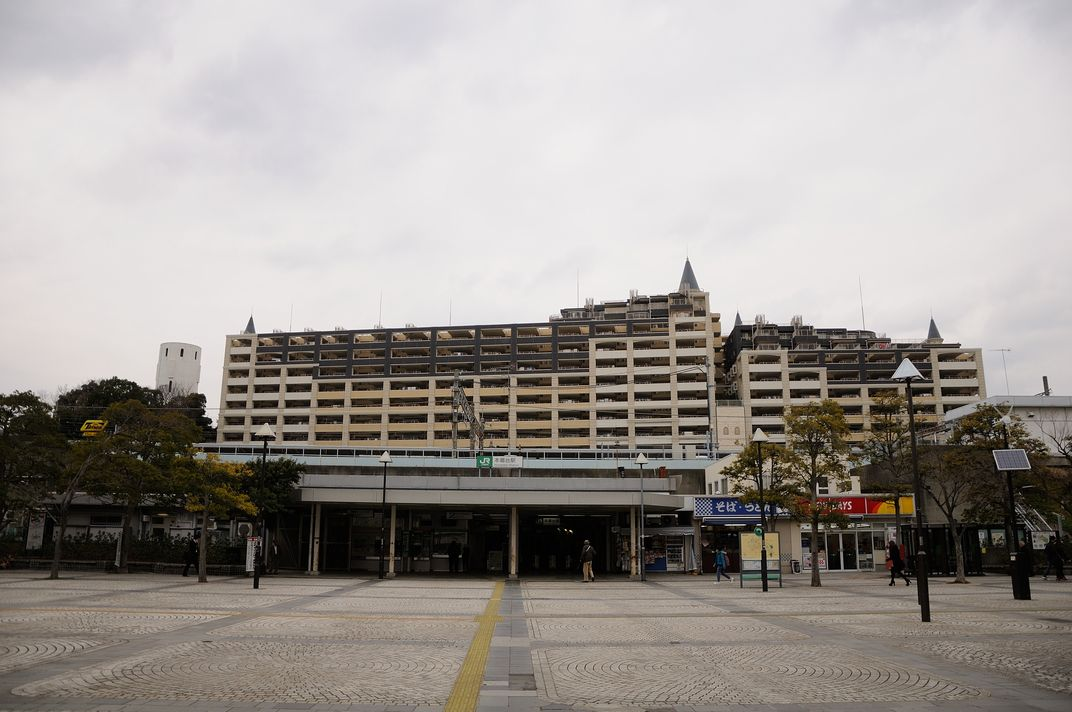 2014年3月19日撮影の本郷台駅。駅裏はマンションが建ち様子が変わった。